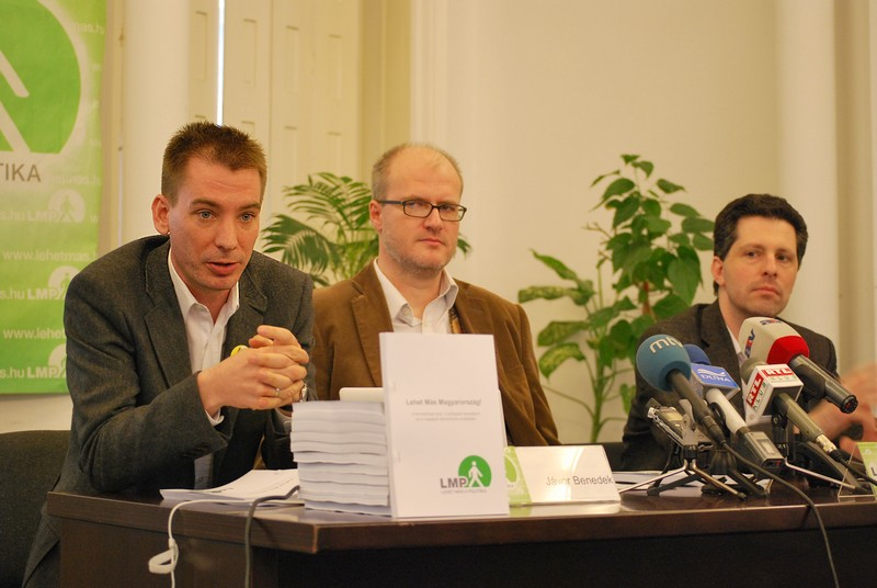 Jávor Benedek és Schiffer András bemutatja az LMP programját a 2010-es választásokra.